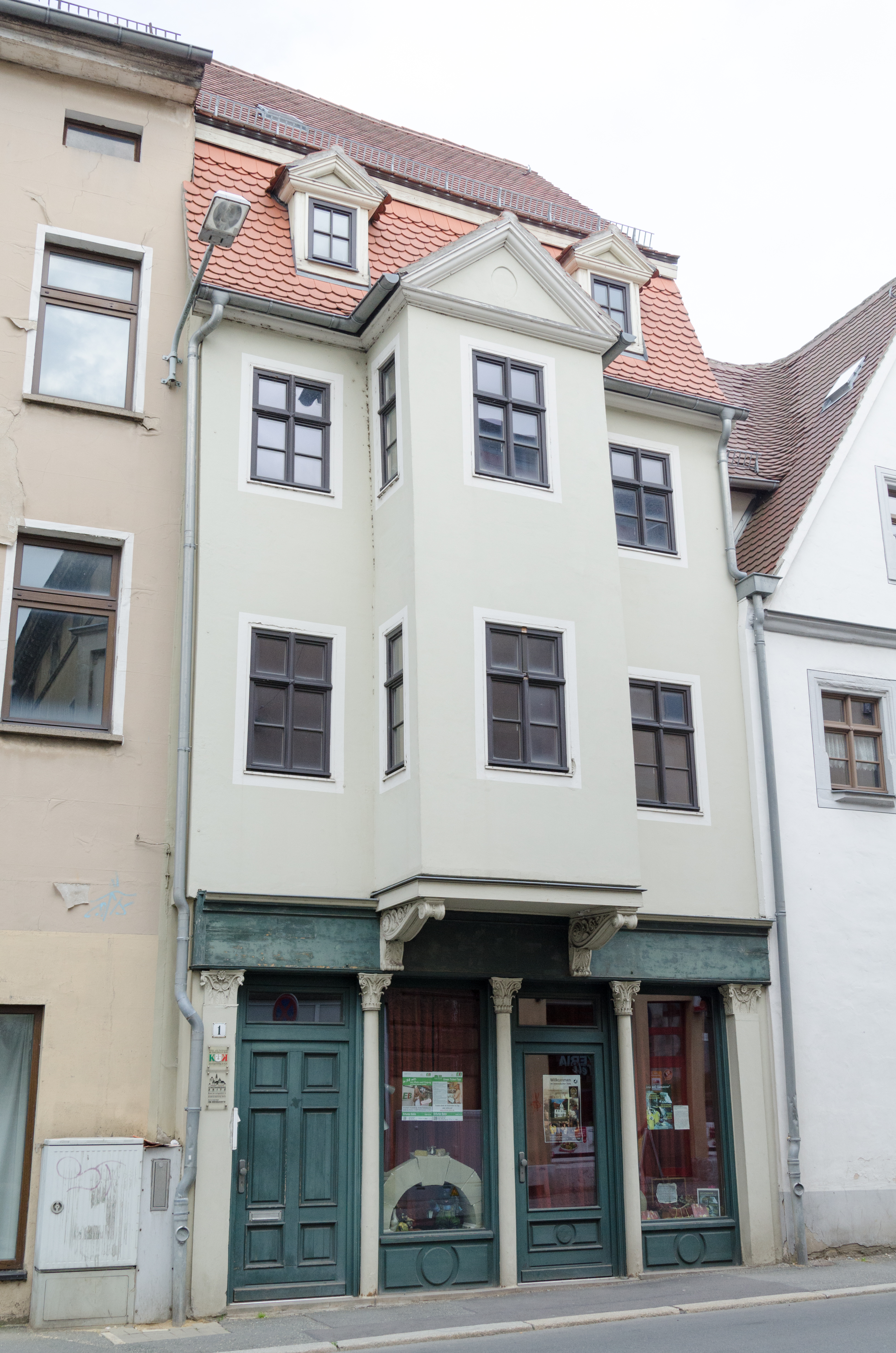 Zeitz, Fischstraße 1